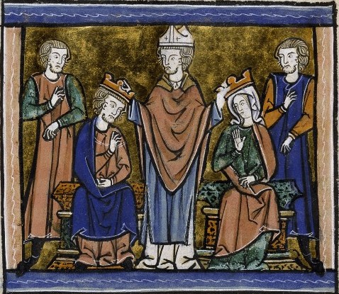 Couronnement de Foulque de Jérusalem